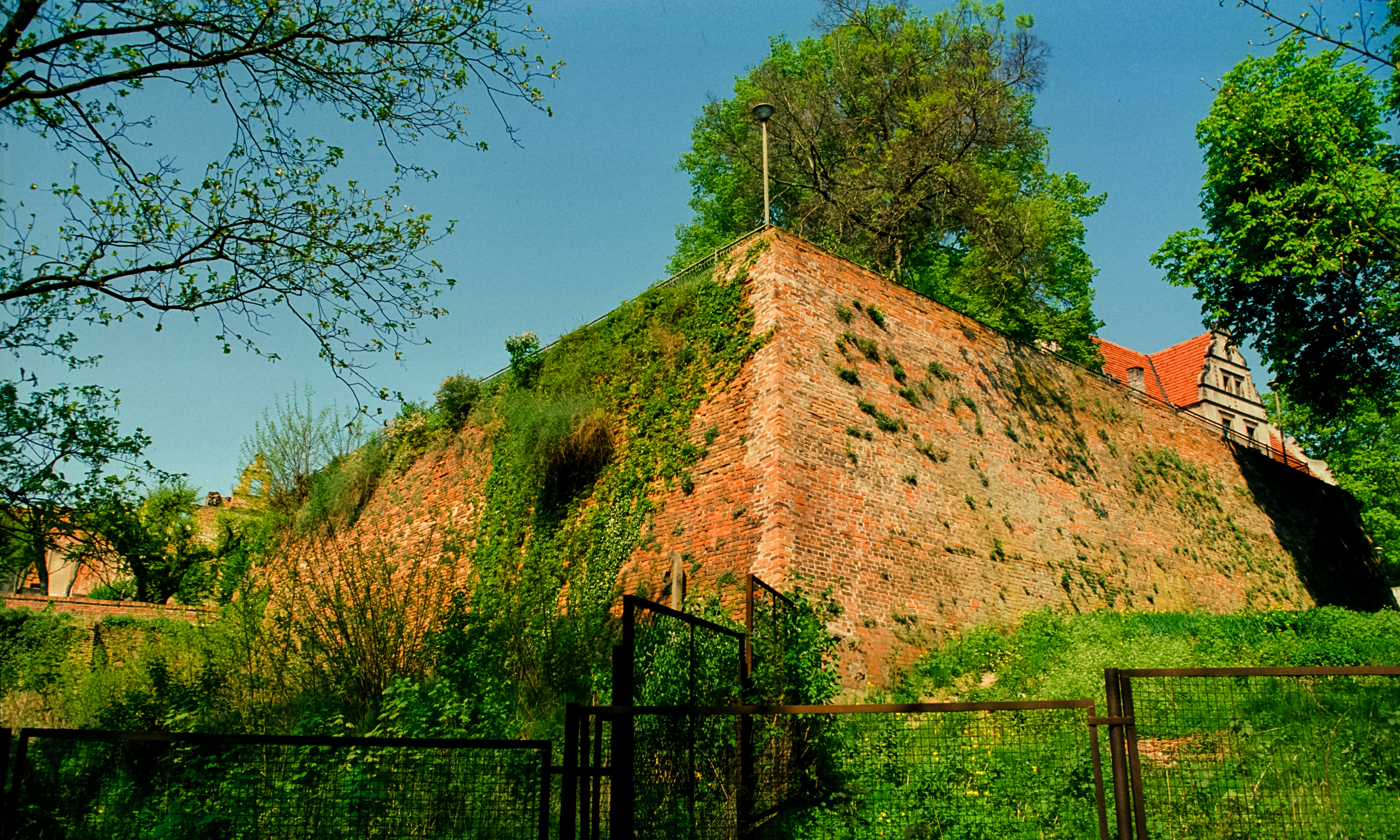 Siedlisko